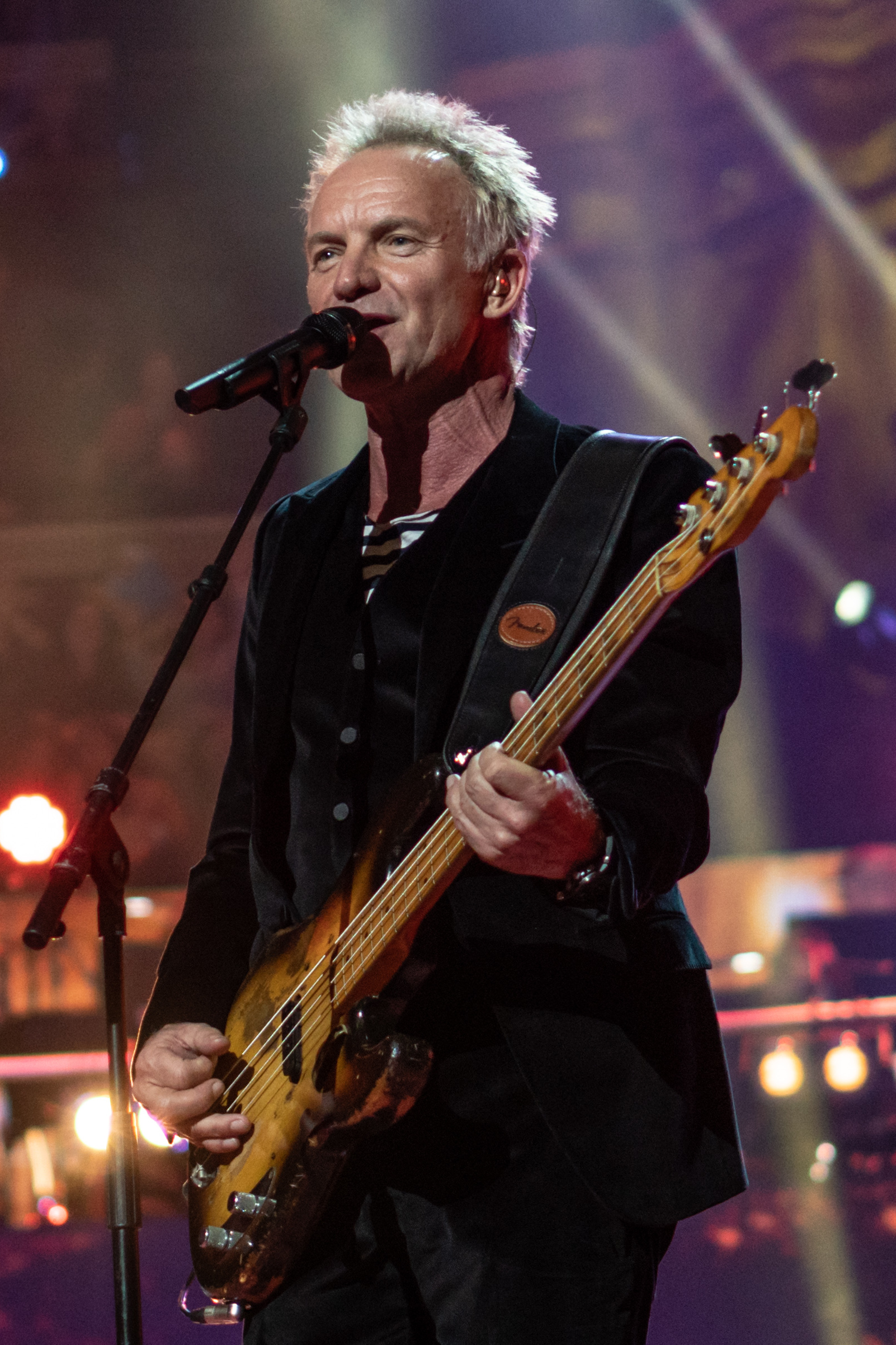 QueenbdayRAH210418-34